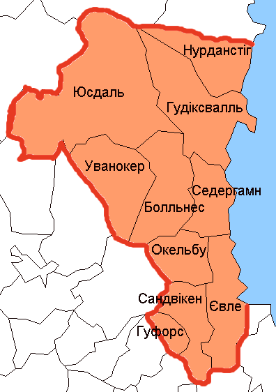 Карта адміністративного поділу лену Даларна у Швеції. Карту створено на основі карти File:Gävleborg County.png.